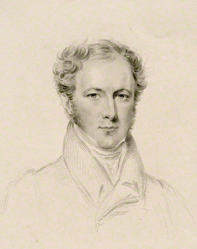 John Evelyn Denison, 1st Viscount Ossington (* 27. Januar 1800; † 7. März 1873), britischer Politiker